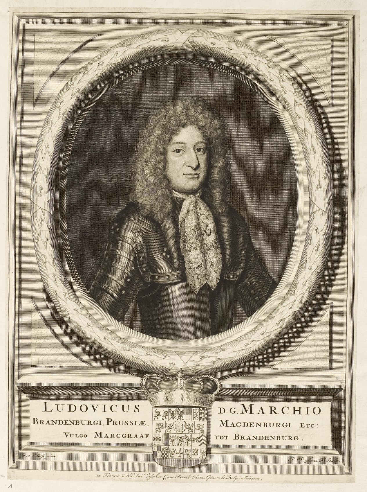 Grafik aus dem Klebeband Nr. 1 der Fürstlich Waldeckschen Hofbibliothek Arolsen Motiv: Ludwig von Brandenburg, Prinz und Markgraf von Brandenburg